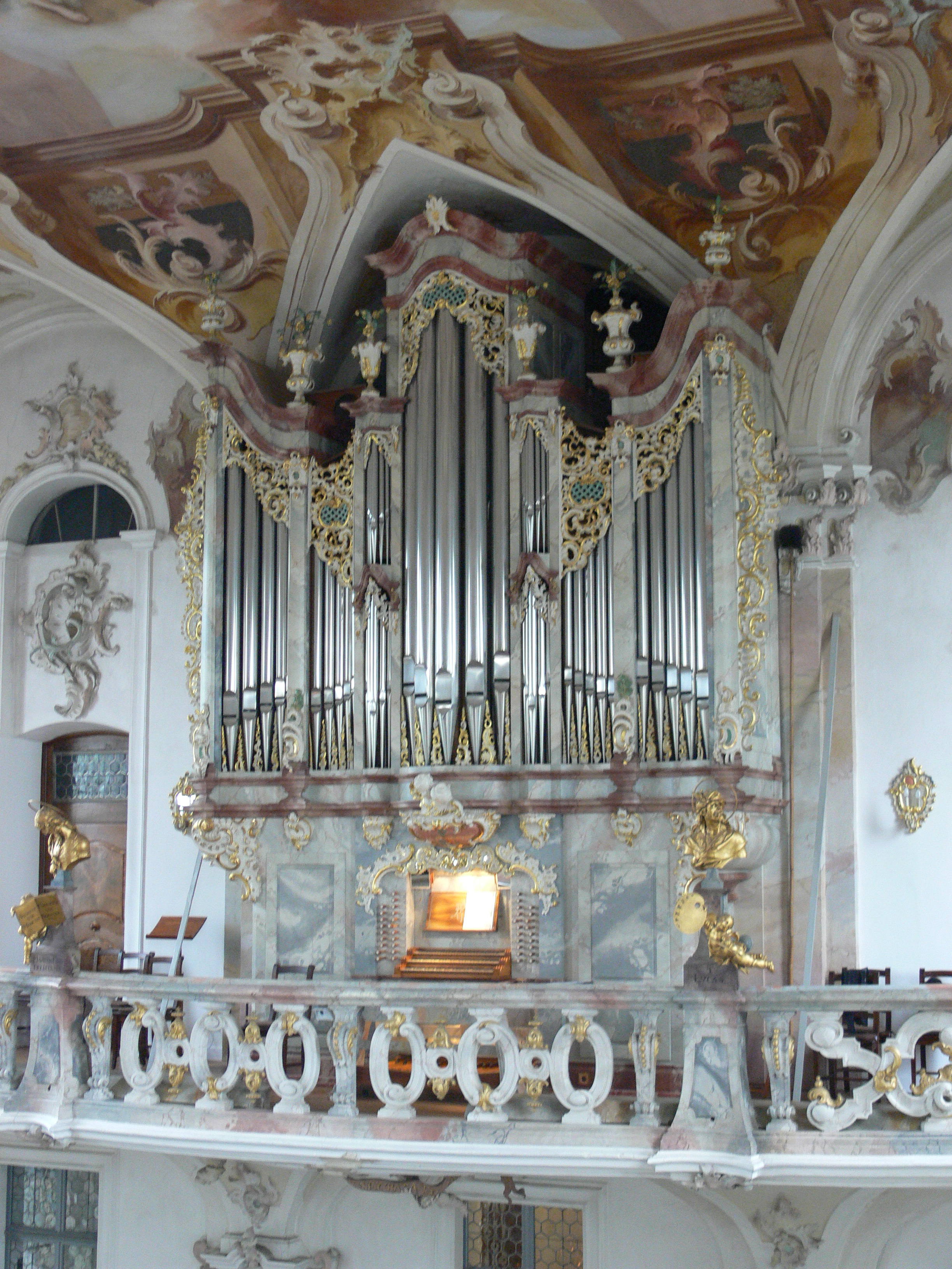 Wallfahrtskirche Birnau, Orgel